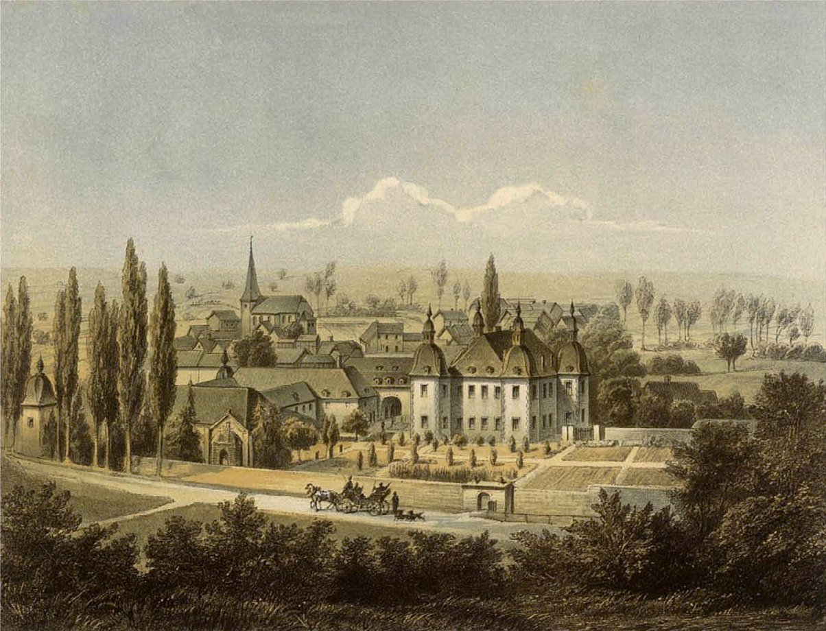 Schloss Eicks, Kreis Schleiden, Rheinprovinz